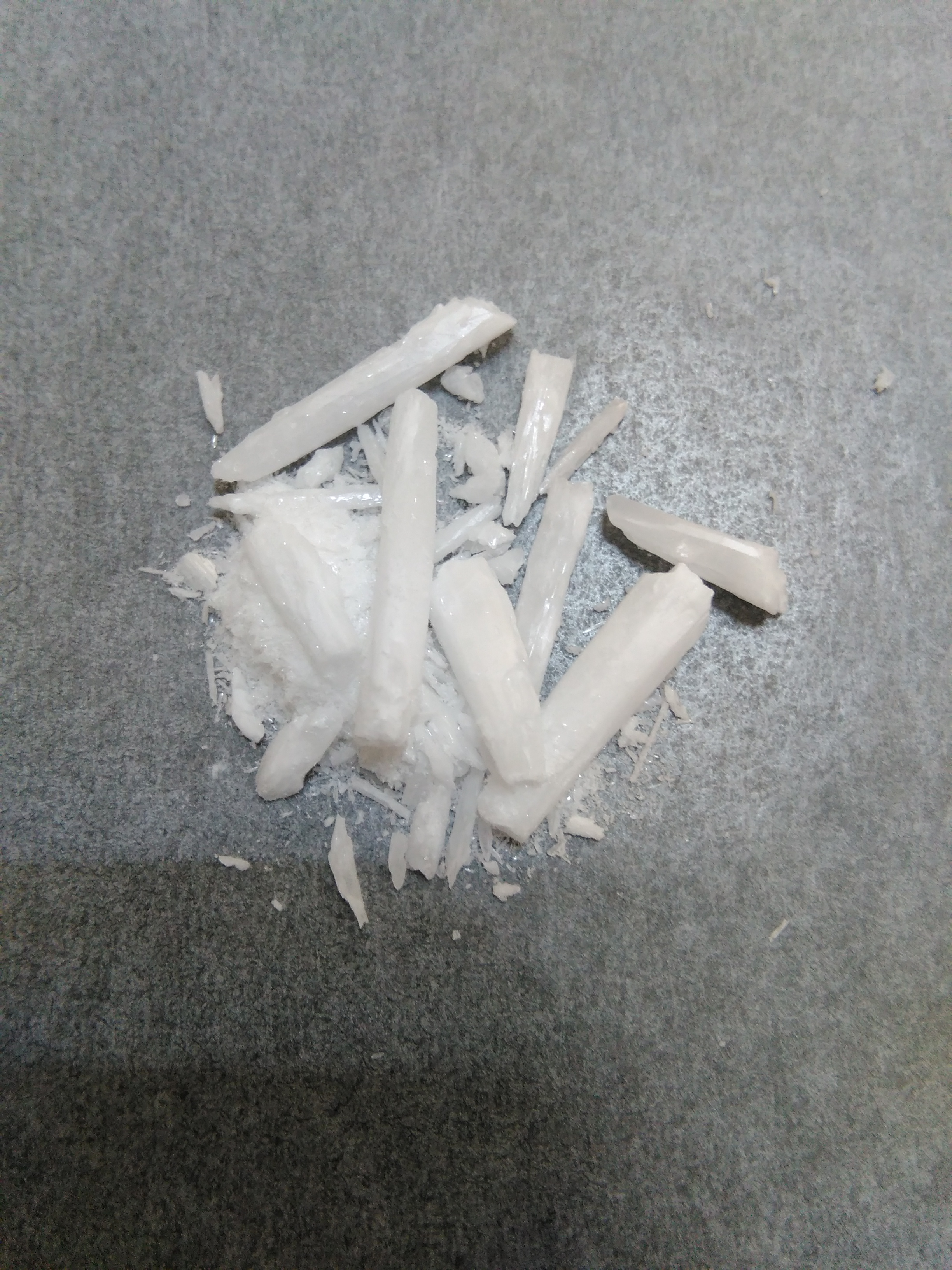 二氧化硒，AR（99%），麦克林。